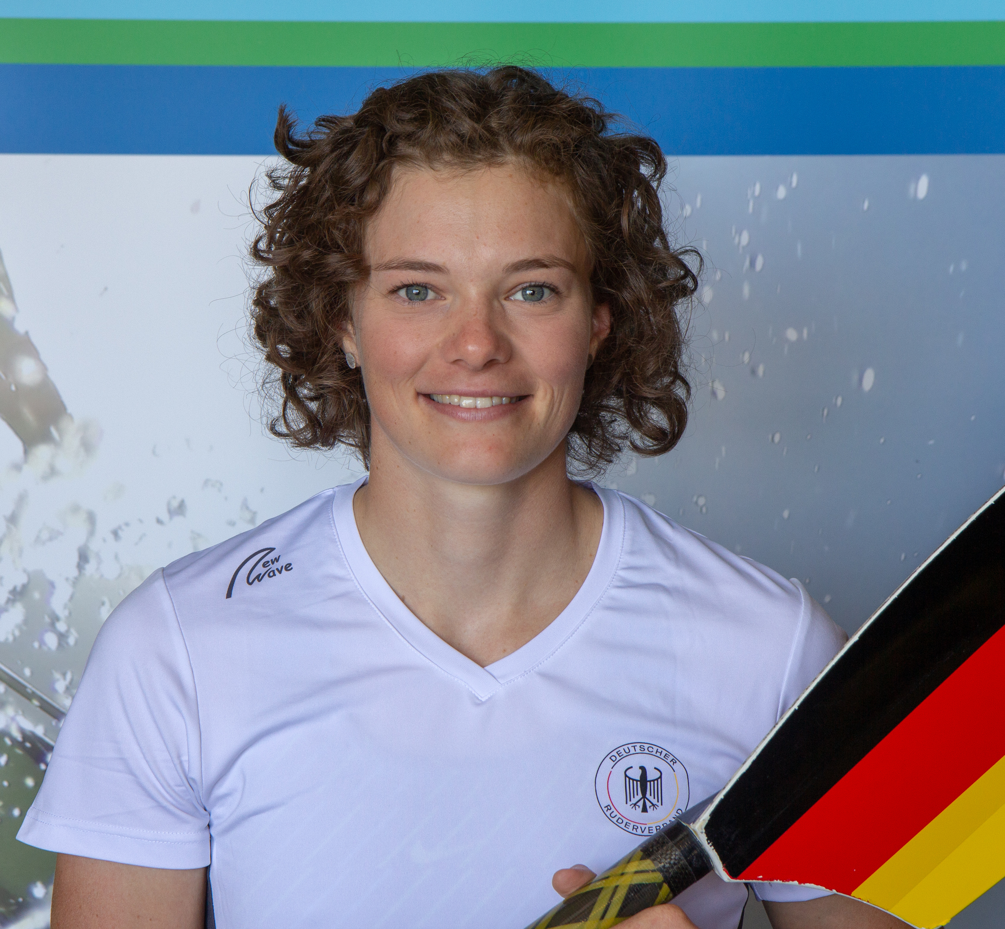 Sophie Oksche beim Medientag des Deutschen Ruderverbandes in der Ruderakademie Ratzeburg am 22. August 2018.